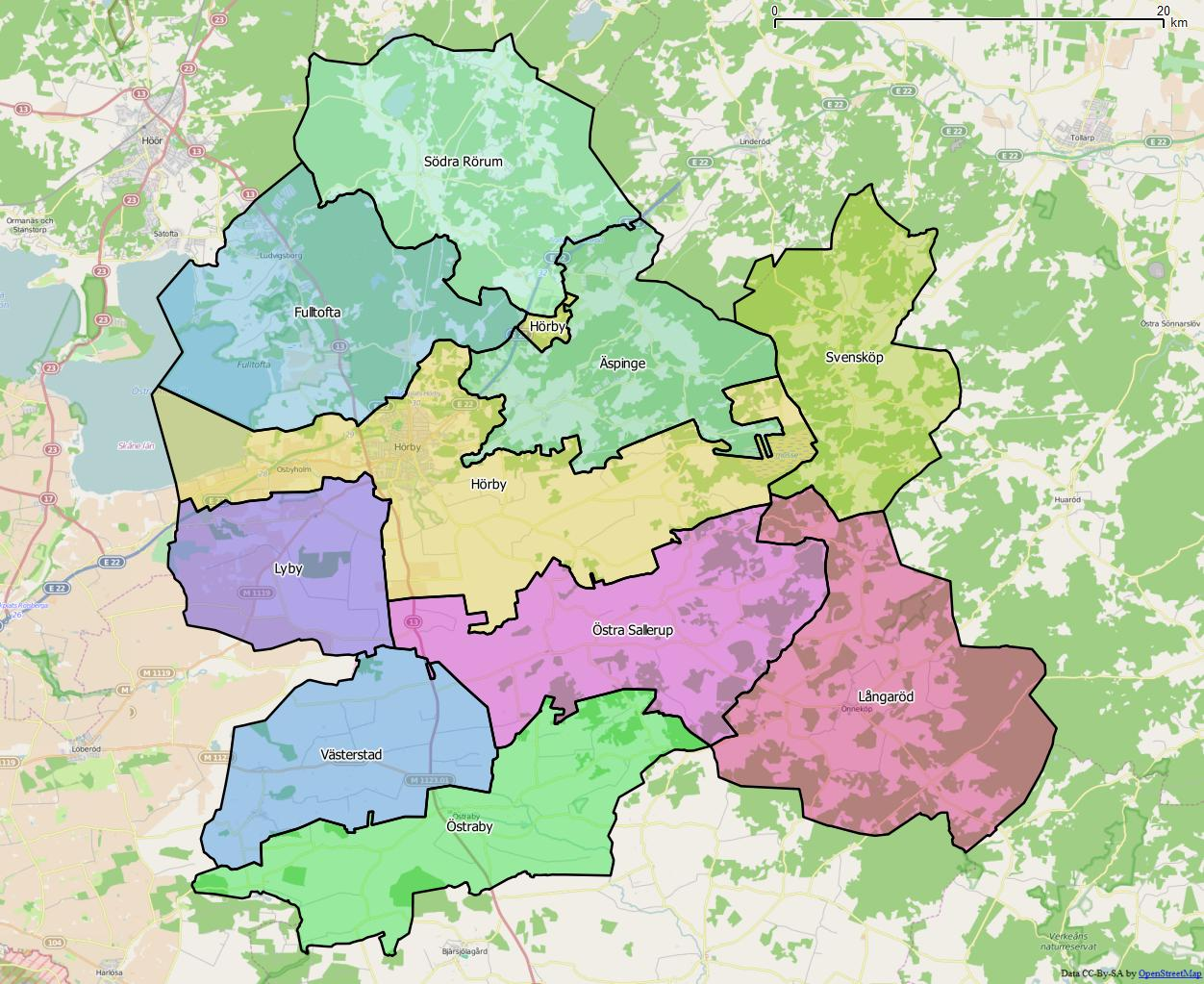 Distriktsindelningen i Hörby kommun World file: 49.46068282122610071 0 0 -49.46068282122610071 1500072.05145702045410872 7552355.63096332084387541